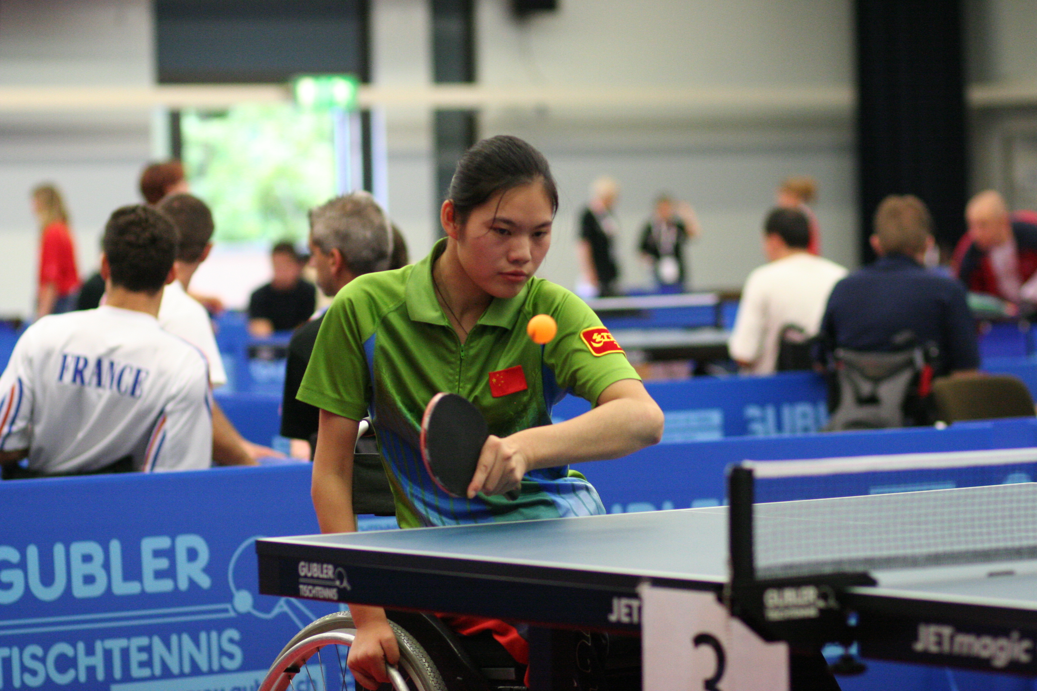 Liu Jing (China)